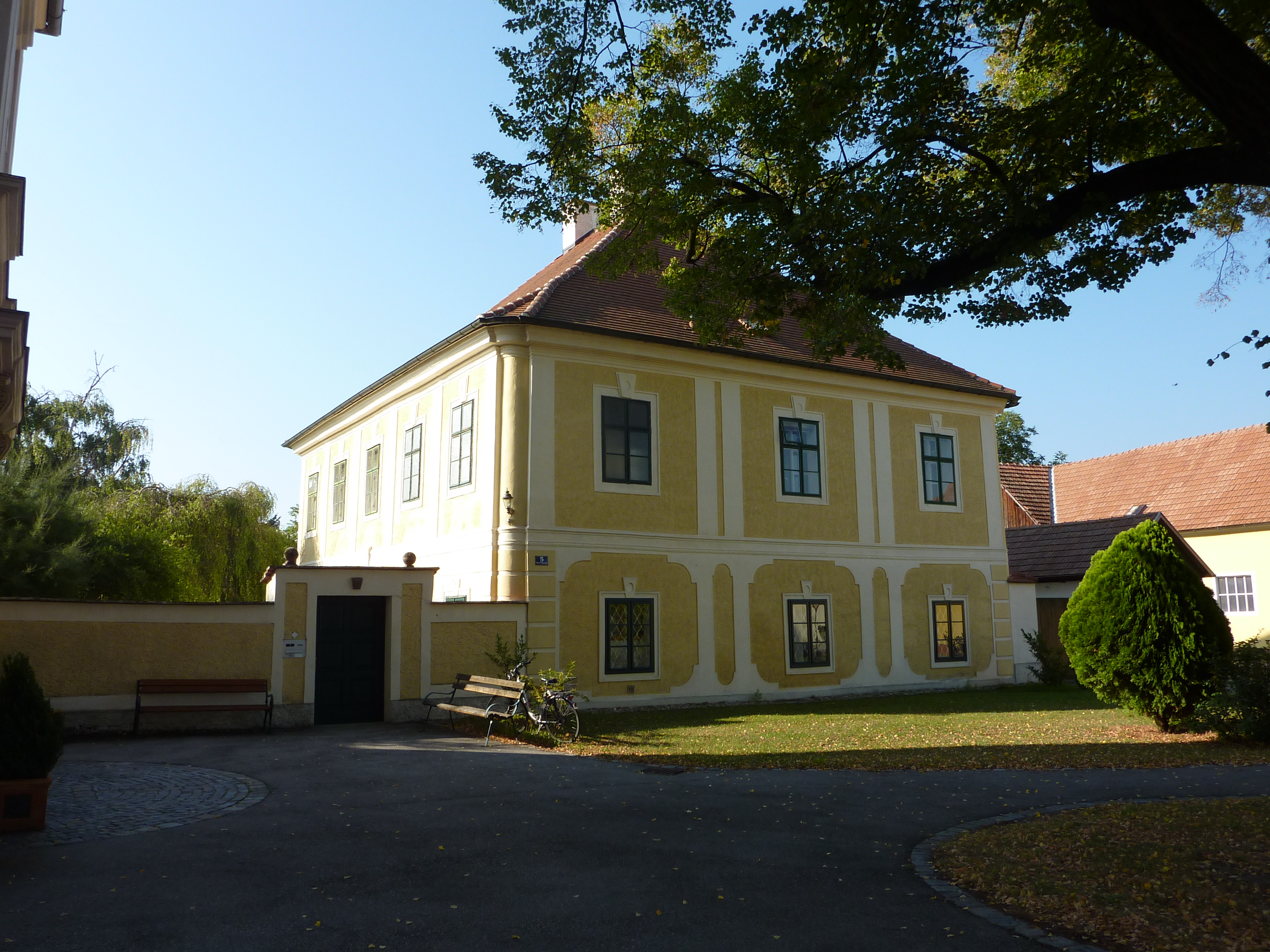 Pfarrhof, Obere Hauptstraße 5, Theiß, Gedersdorf, Niederösterreich